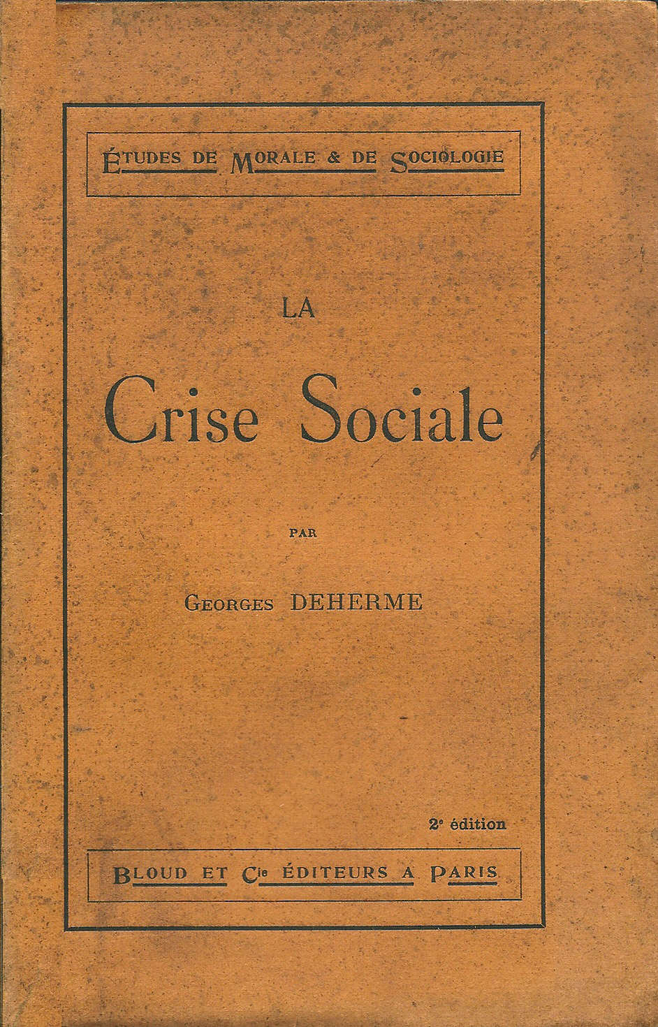 Couverture de l'ouvrage : Georges Deherme, La Crise Sociale, Paris, Bloud & Cie, 1910, in-16°, 373 p.